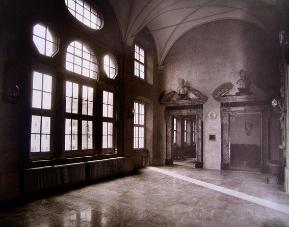 Atrio dello Zodiaco con meridiana a pavimento